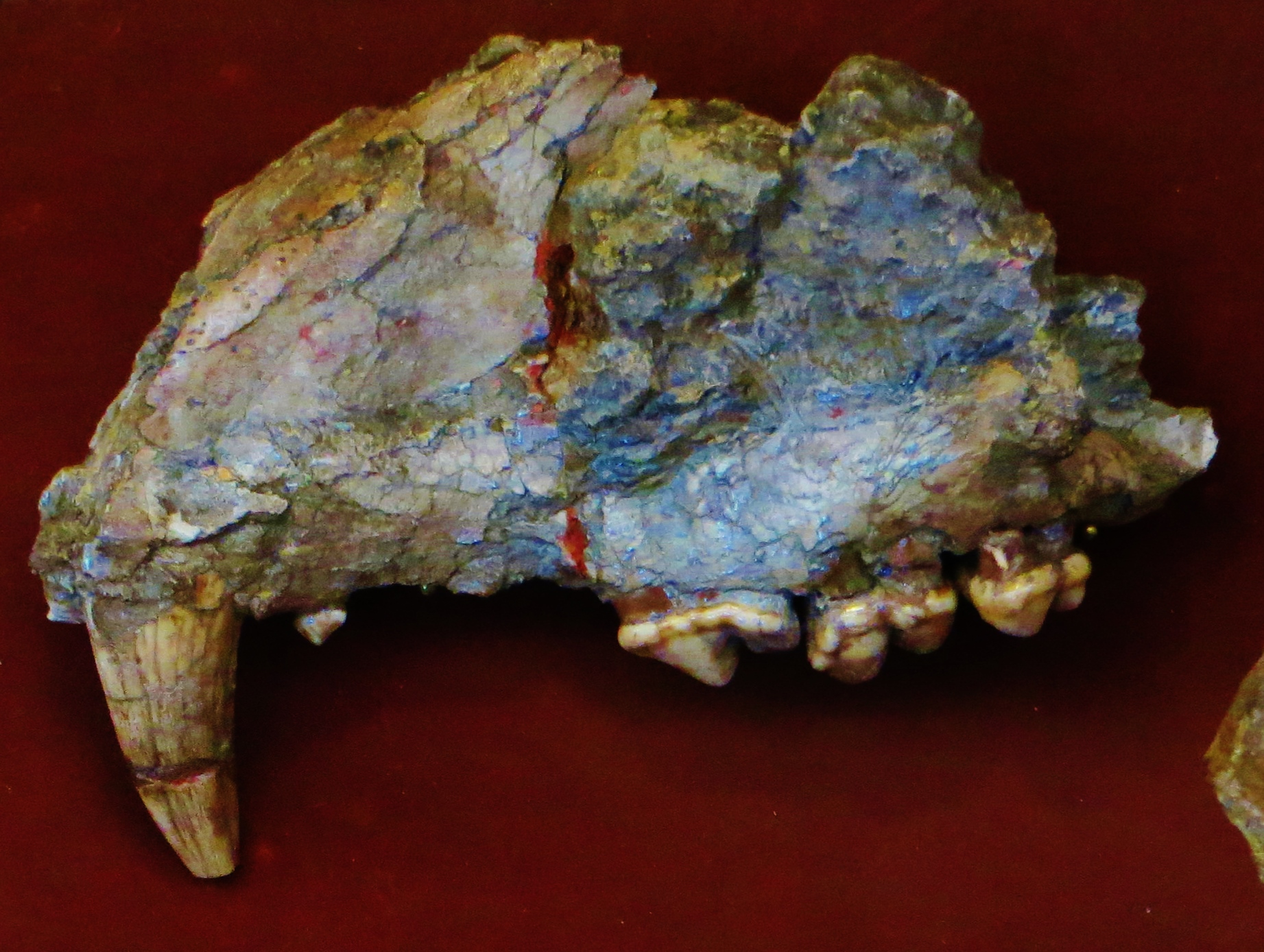 Fossil of Amphicyon, an extinct mammal - Took the photo at Museum Histoire Naturelle, Paris